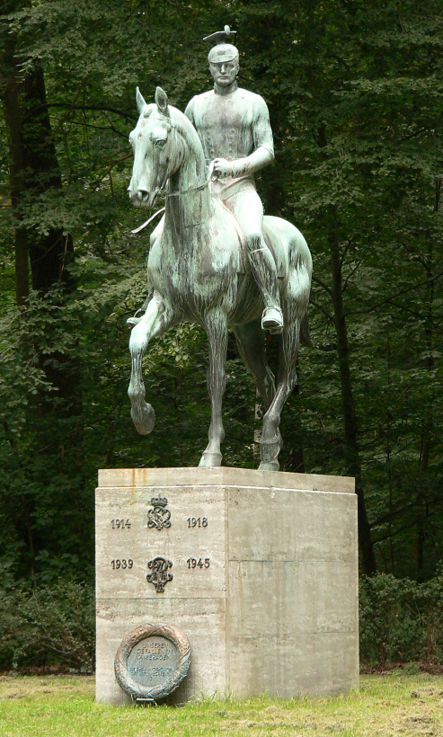 Kriegsdenkmal für Reiterregiment